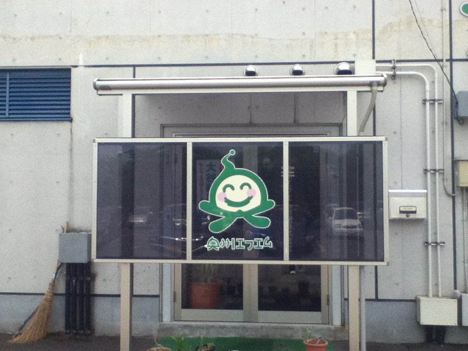 奥州エフエム本社スタジオ正面玄関